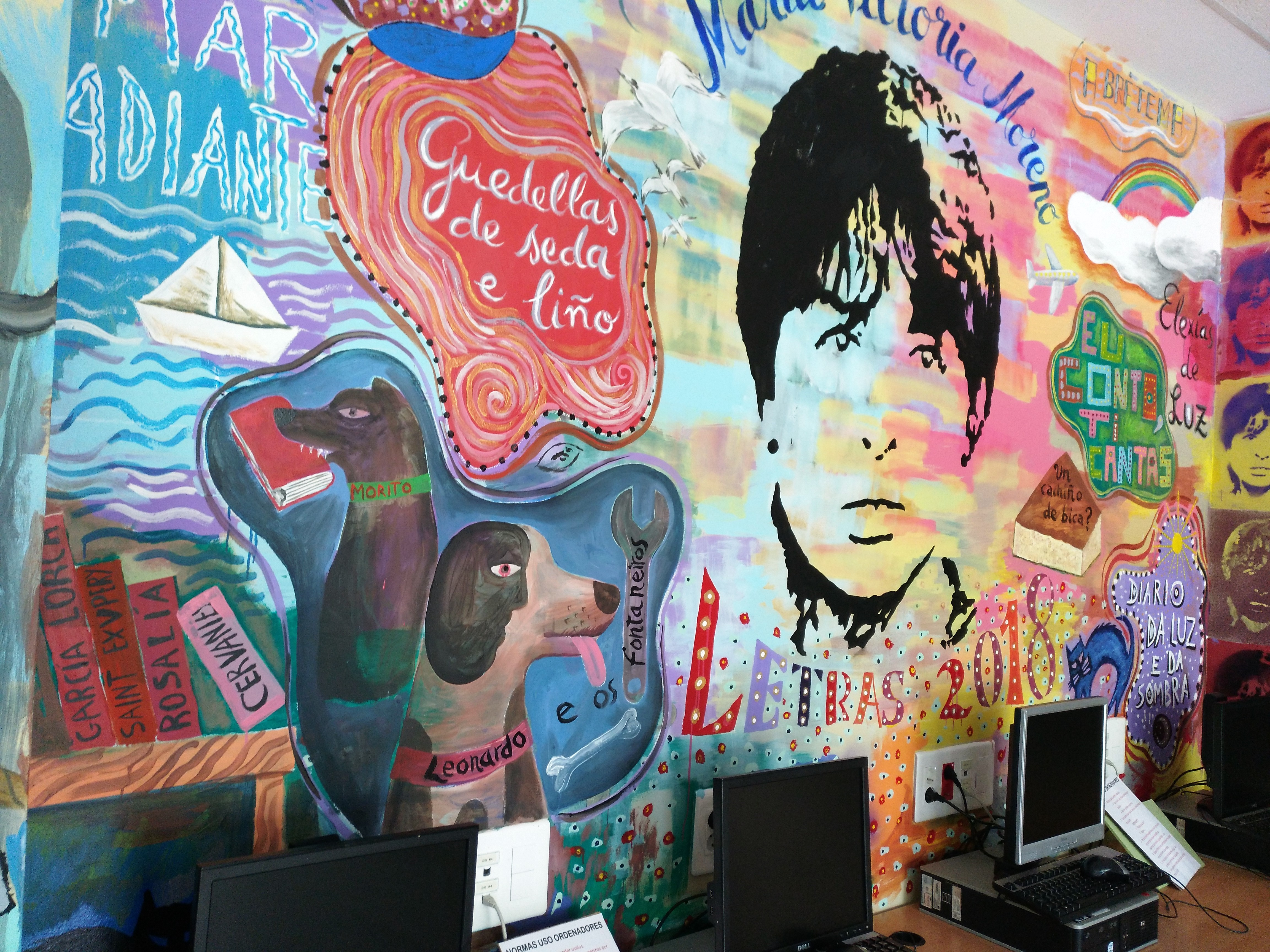 Homenaxe a María Vitoria Moreno na Biblioteca do IES G. Torrente Ballester de Pontevedra. Abril 2018